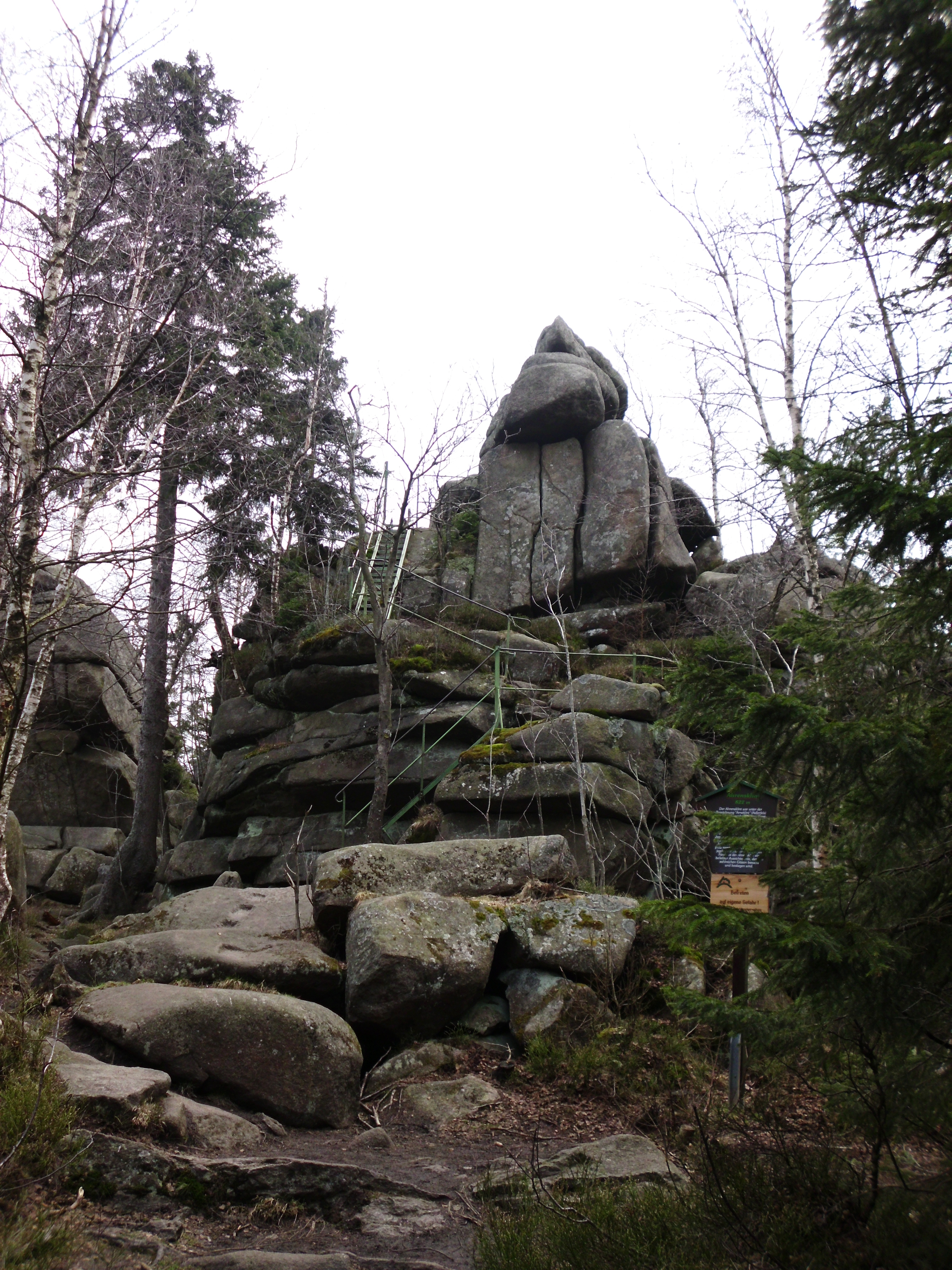 Ahrensklint, Klippe bei Schierke am Brocken